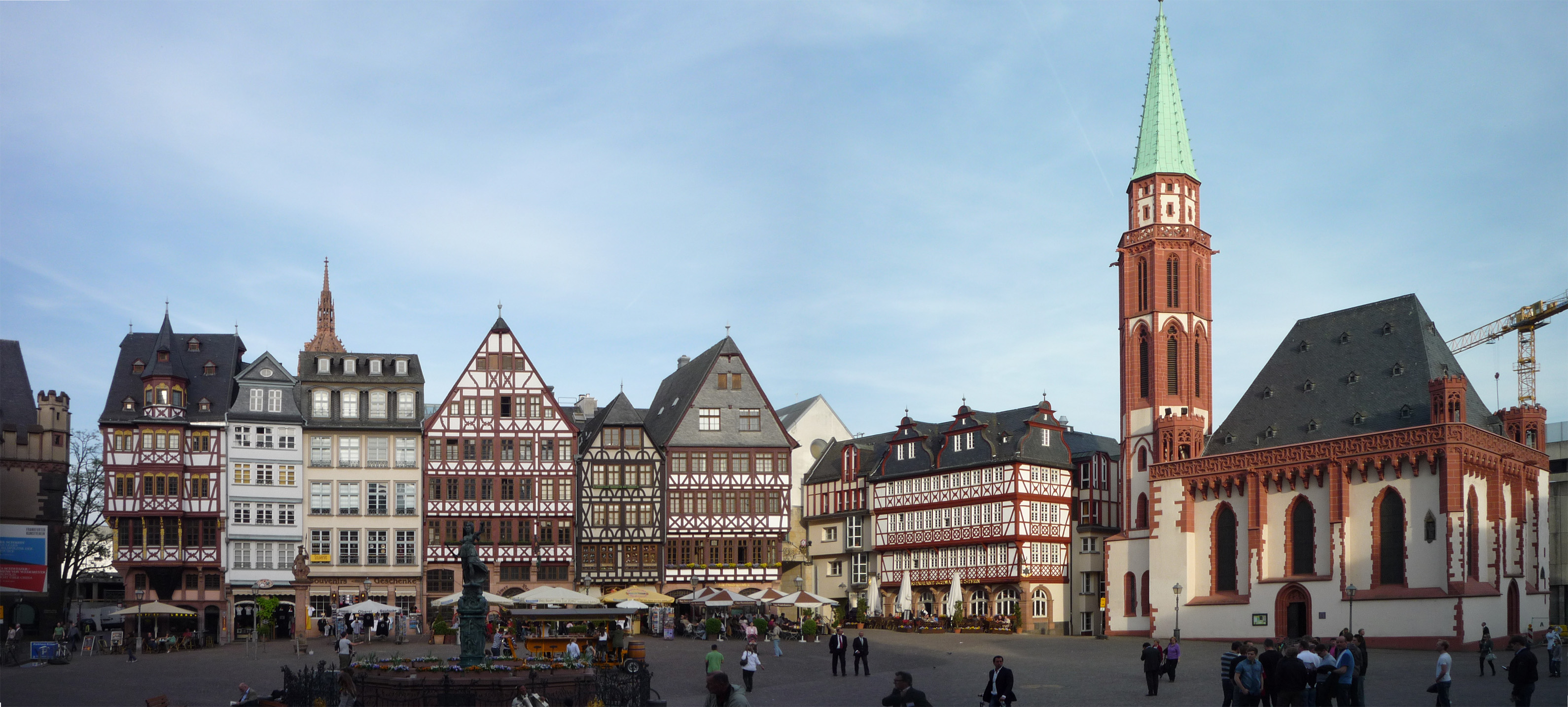 Frankfurt Altstadt: Römerberg Ostzeile und Alte Nikolaikirche